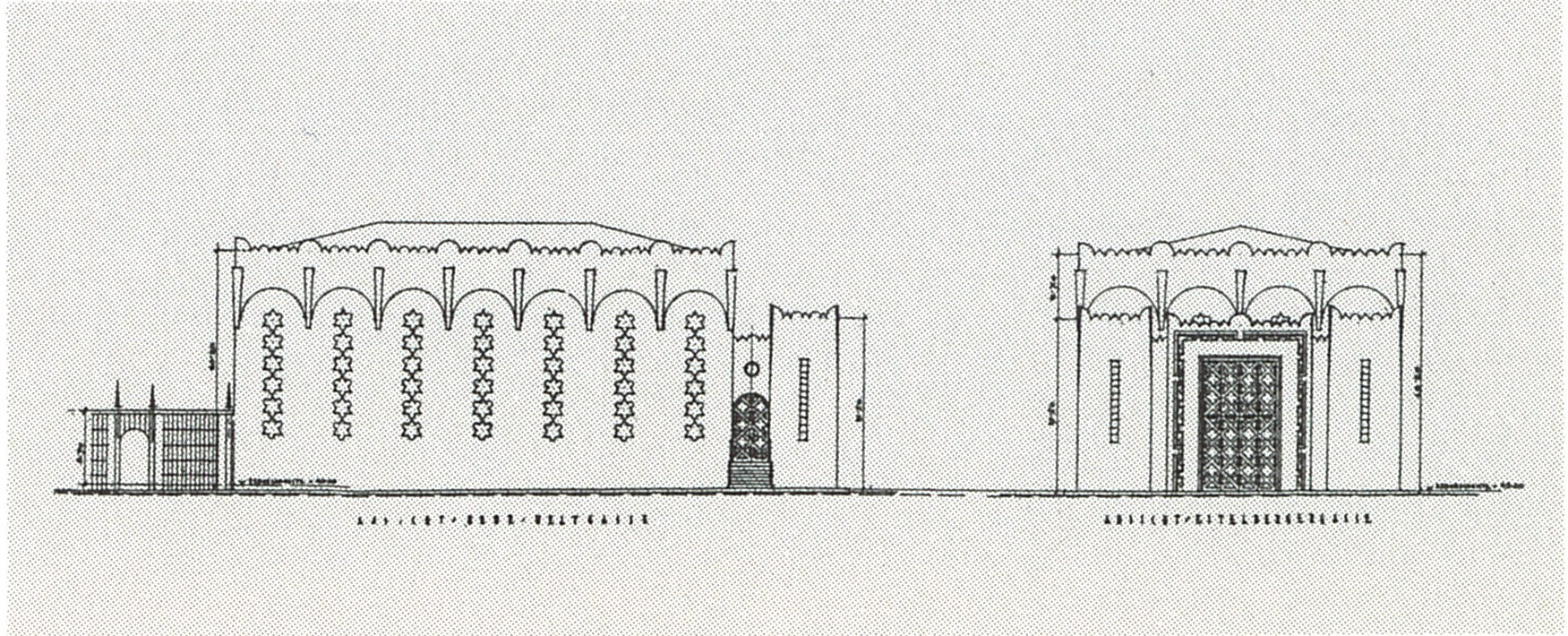 Baupläne für die Synagoge in Hietzing, Eitelberggasse 22, von Arthur Gruenberger (* 11.04.1882 - † 21.08.1935) und Adolf Jelletz (* 22.03.1879 - † 14.07.1936).